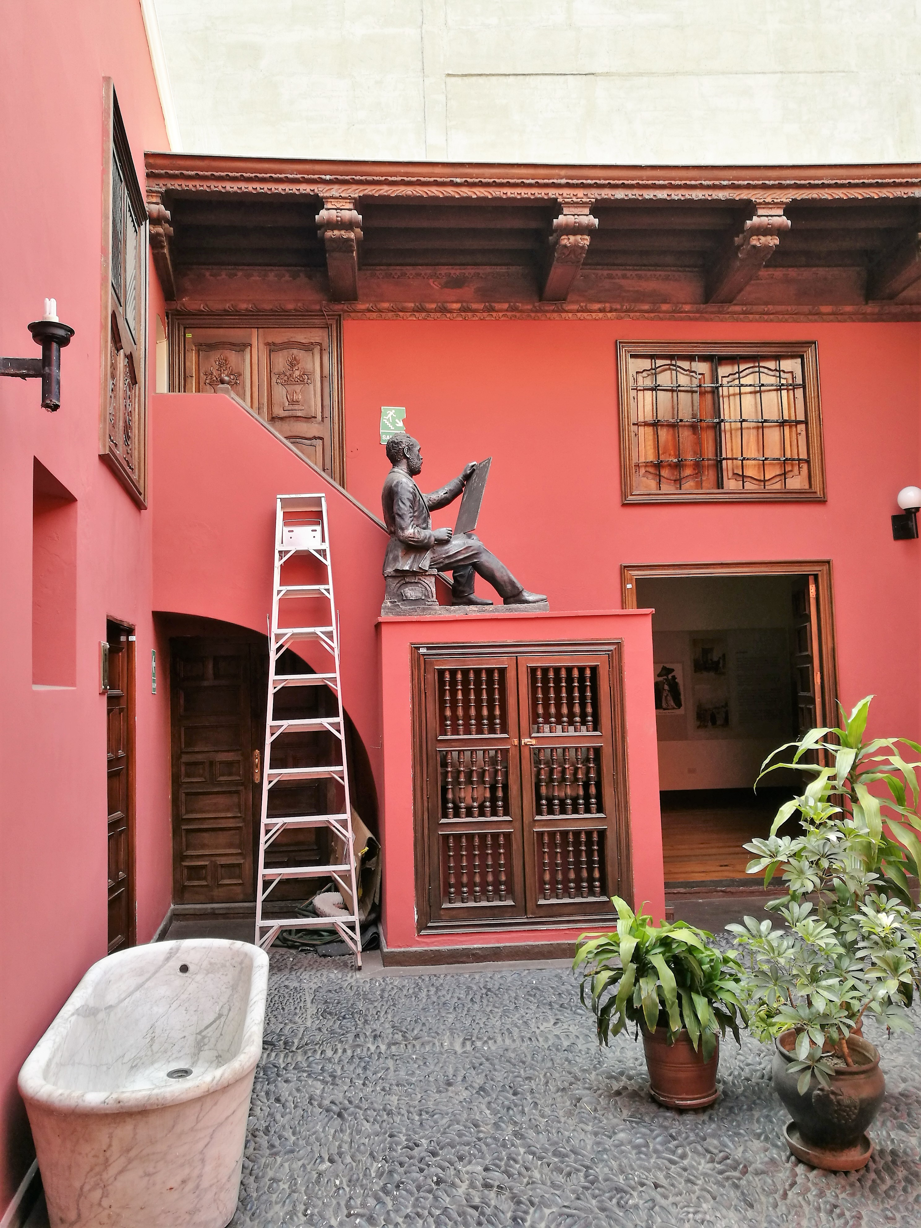 Pati interior del Museo Nacional Afroperuano